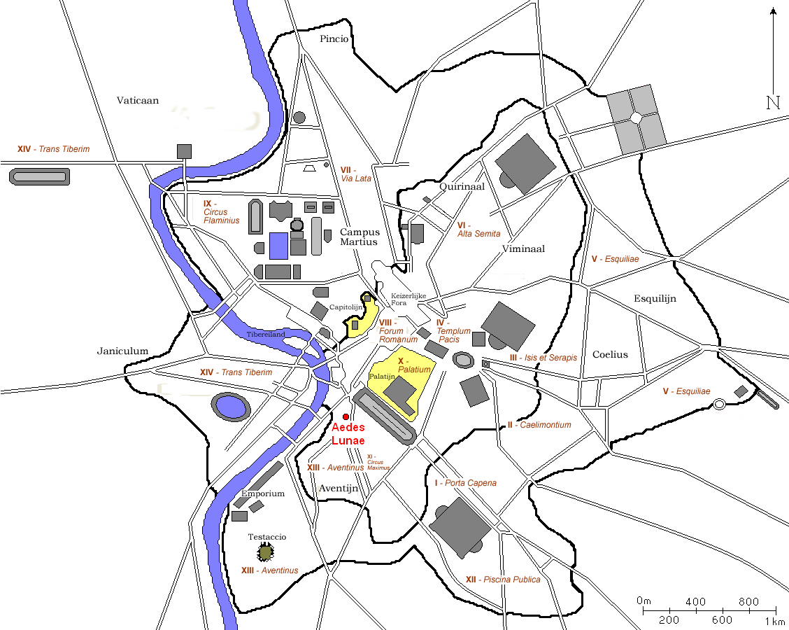 (autore=mac9, fonte=da Commons File:Plan Rome- Tempel van Luna.png Tempio della Luna a Roma)